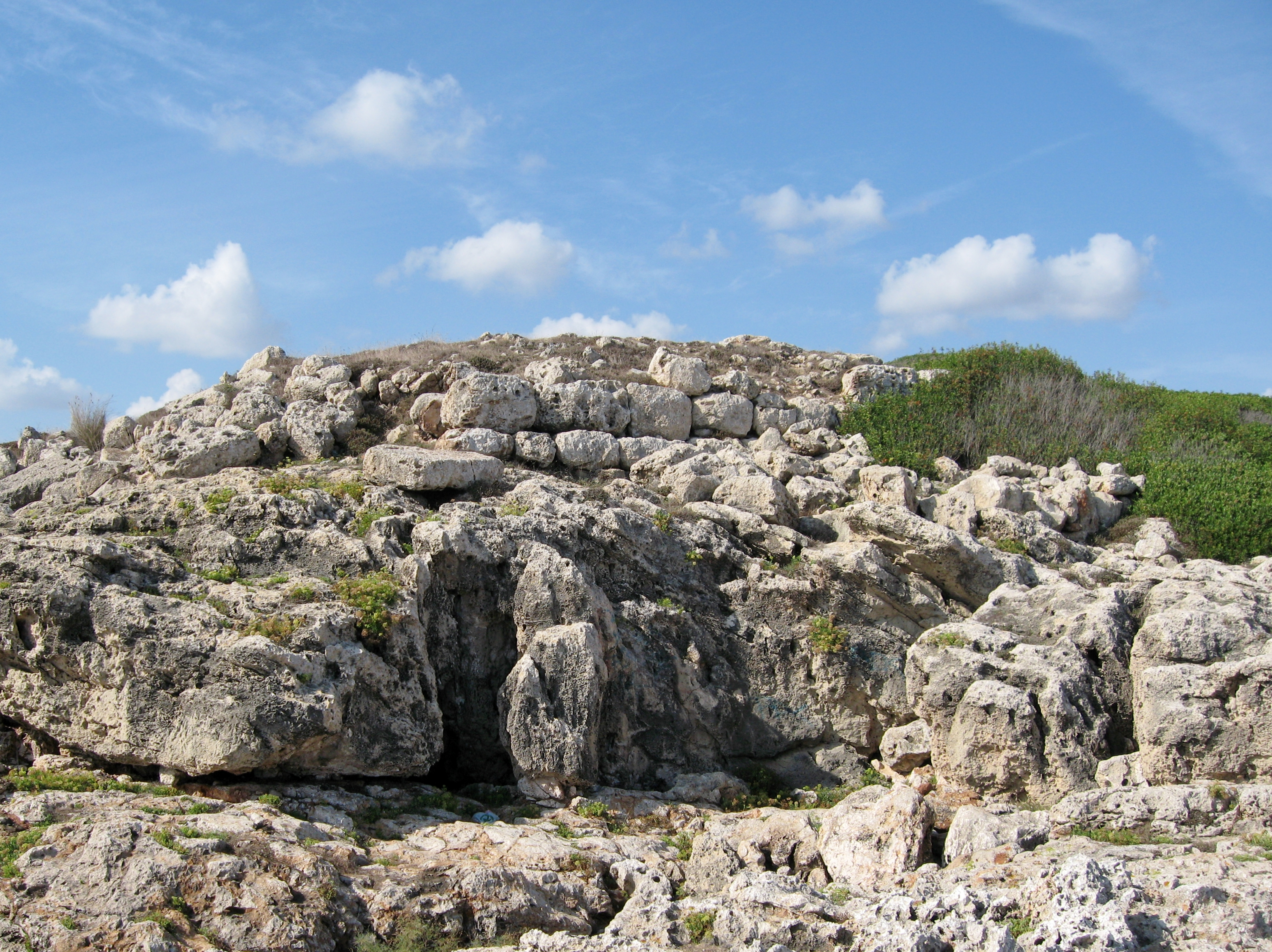 Talayot an der Küste der Siedlung Cala Morlanda, Gemeinde Manacor, Mallorca, Spanien